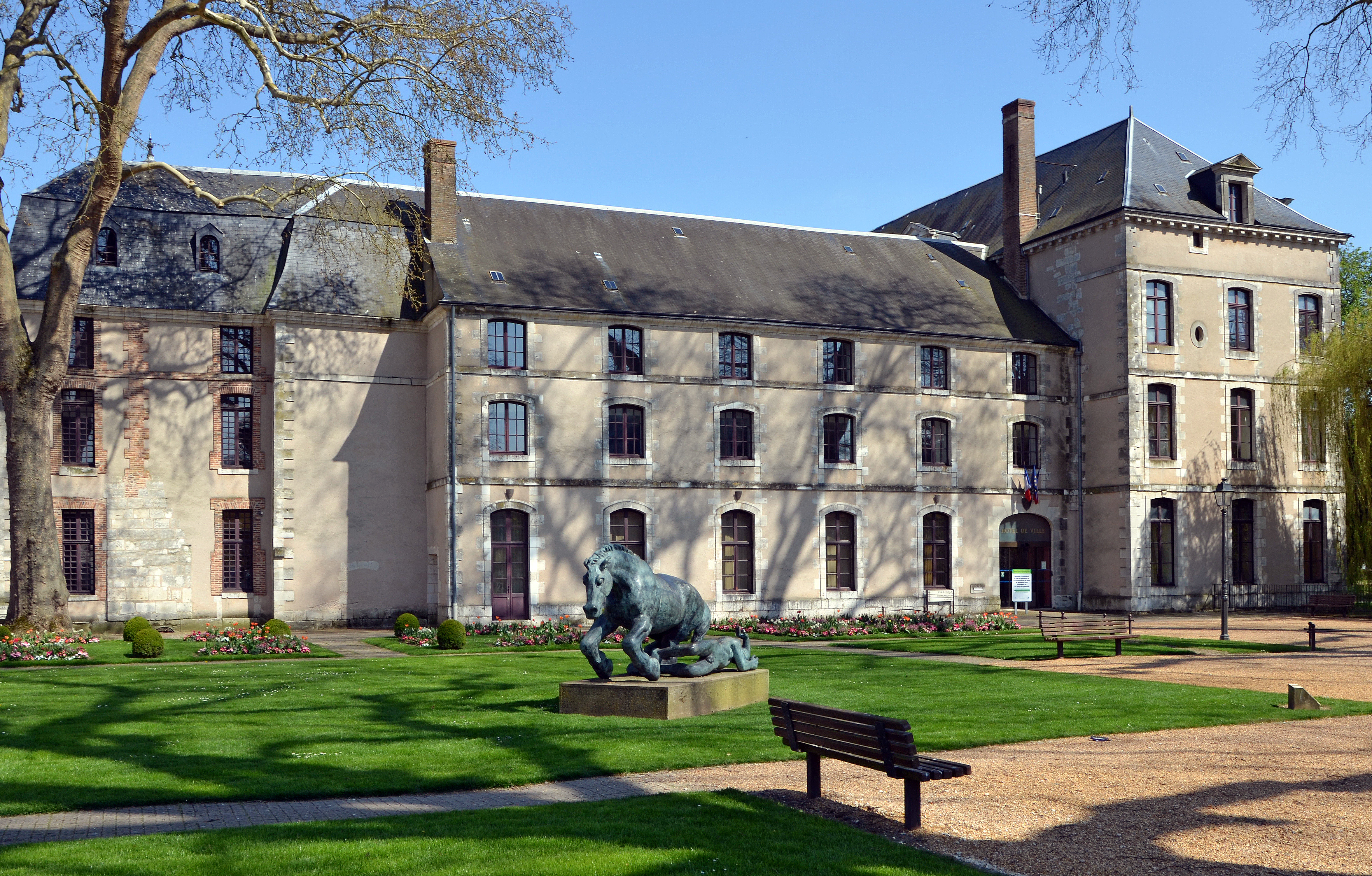 Bâtiments de l'ancien lycée Ronsard, à Vendôme, en Loir-et-Cher (France) This building is en partie classé, en partie inscrit au titre des Monuments Historiques. .